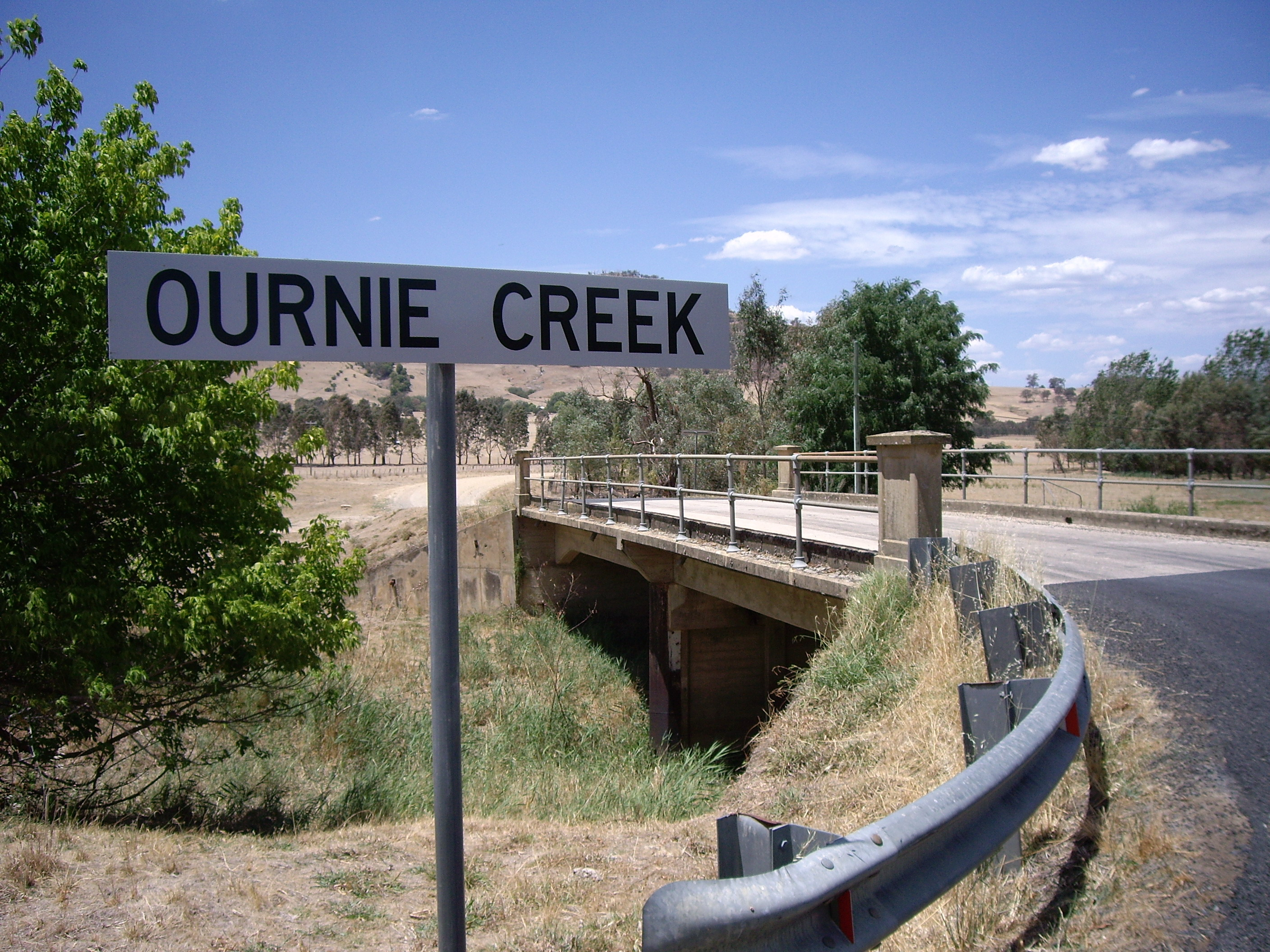 Ournie Creek